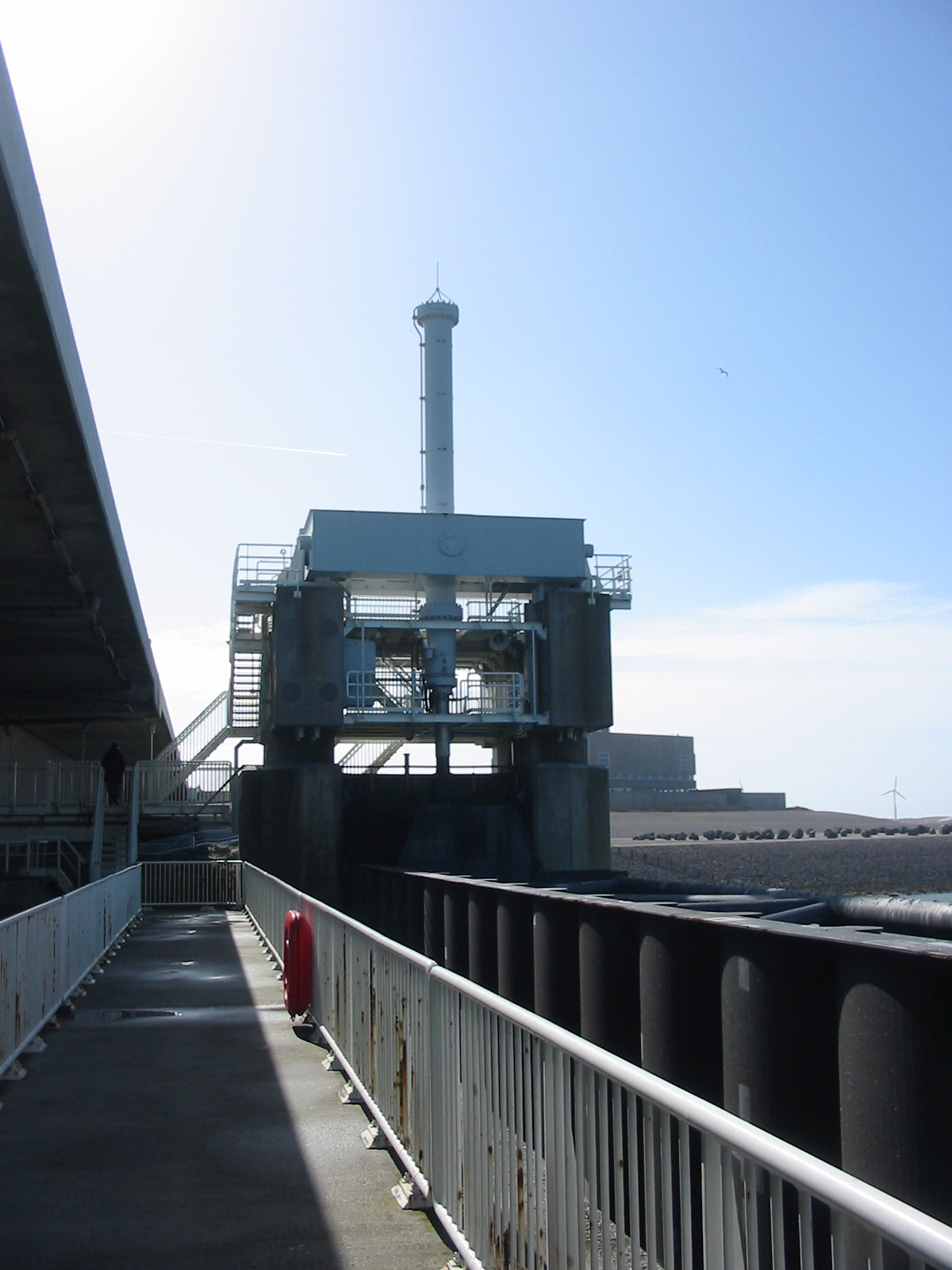 Oosterscheldekering, detail, Netherlands